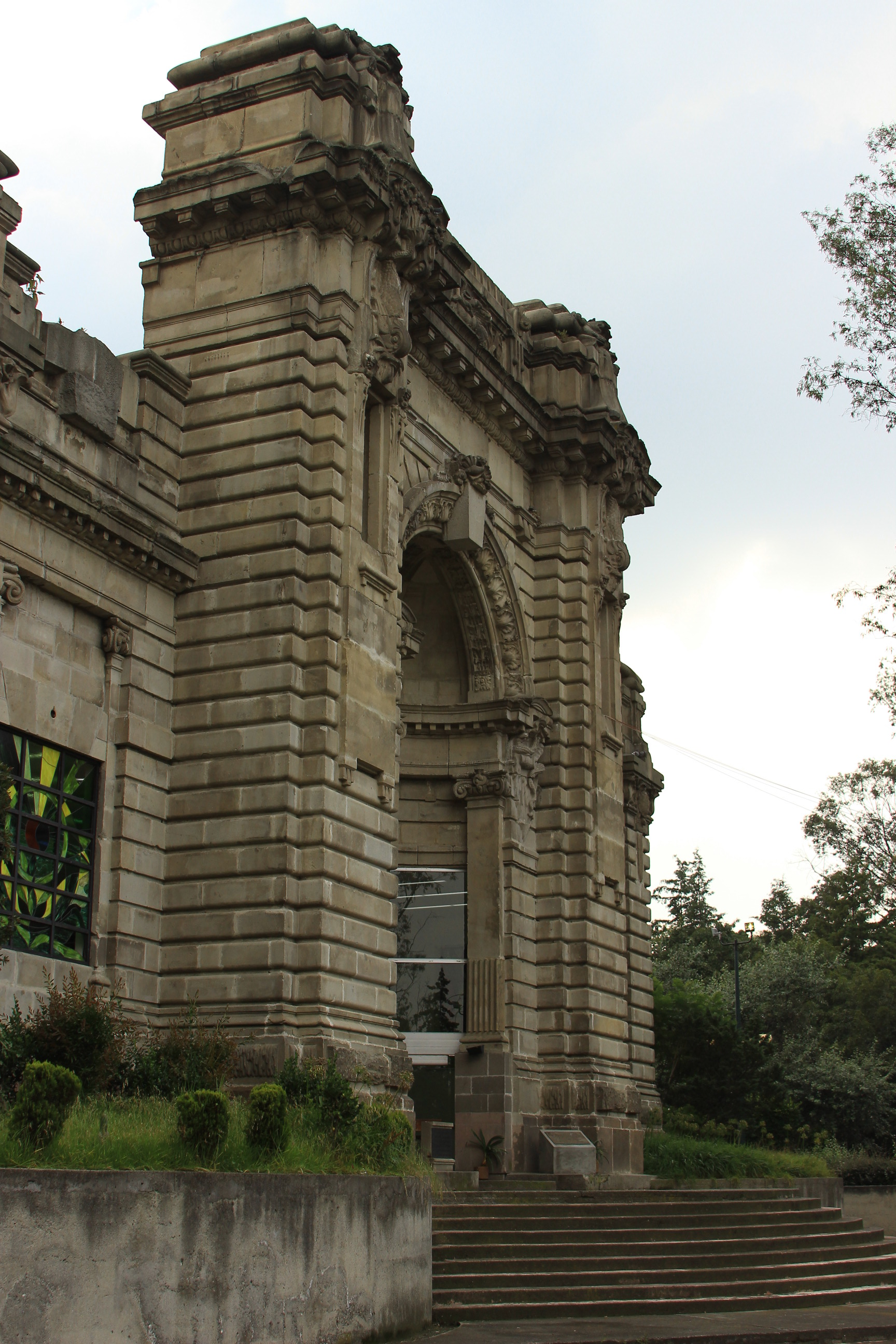 Ángulo fotográfico normal. Entrada a la Casa de Cultura de Tlalpan en Camino a Santa Teresa en Tlalpan, Ciudad de México.